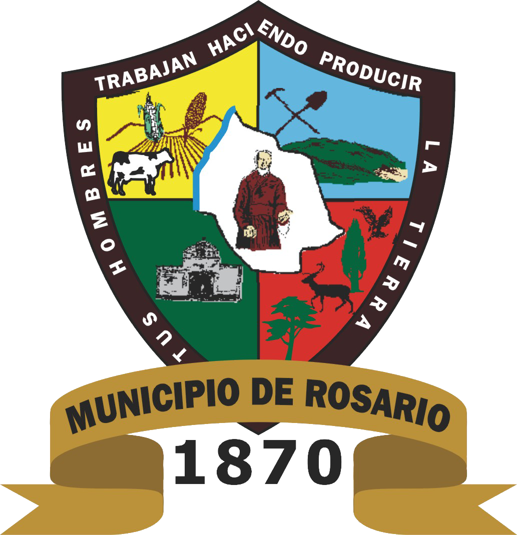 Escudo del municipio sonorense.